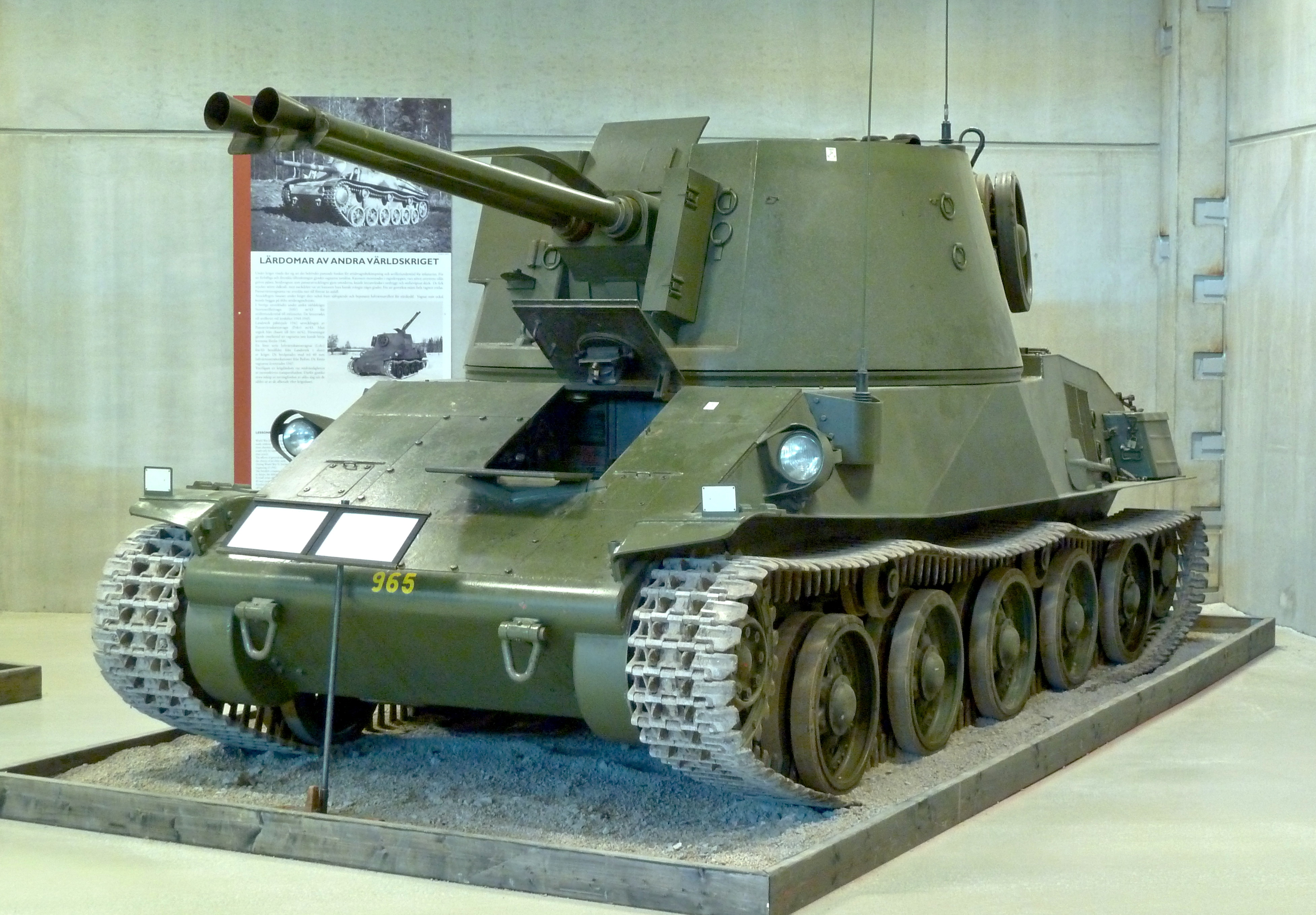 Luftvärnskanonvagn fm/43 finns i Arsenalen Strängnäs 12.08.2011